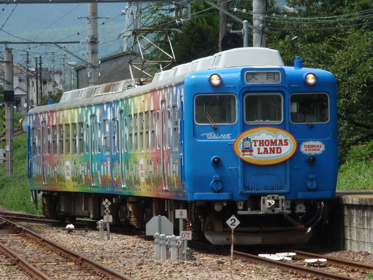 Fujikyuko Co., EMU type 5000 at Kawaguchiko Sta.